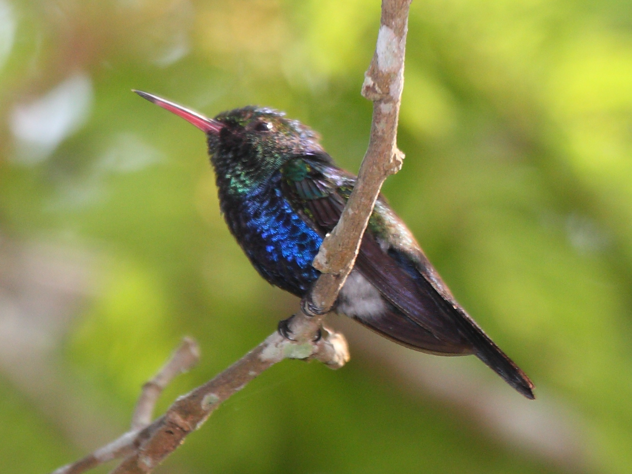 Violet-bellied Hummingbird (Damophila julie)